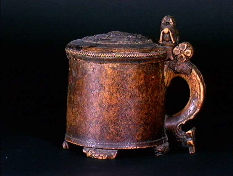 Drikkekanne med skåret datering 1772. Fra Oscar IIs samlinger. Nå på Norsk Folkemuseum. Høyde 22 cm. NF.1907-0165.